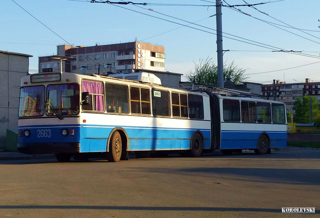 Челябинский ЗиУ-683В00 на Ул. Молдавская